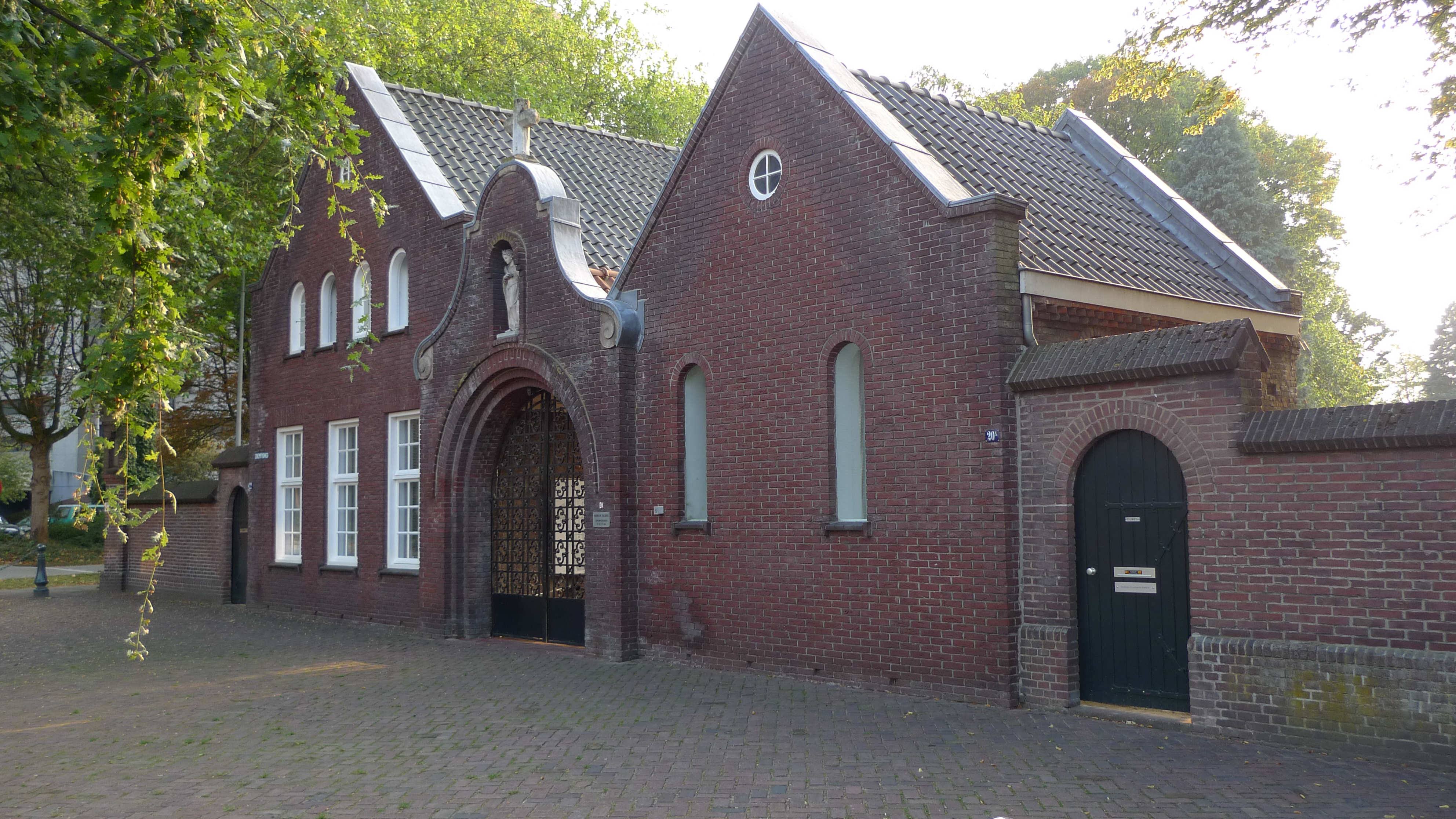 Nederlands rijksmonument nr. 518780